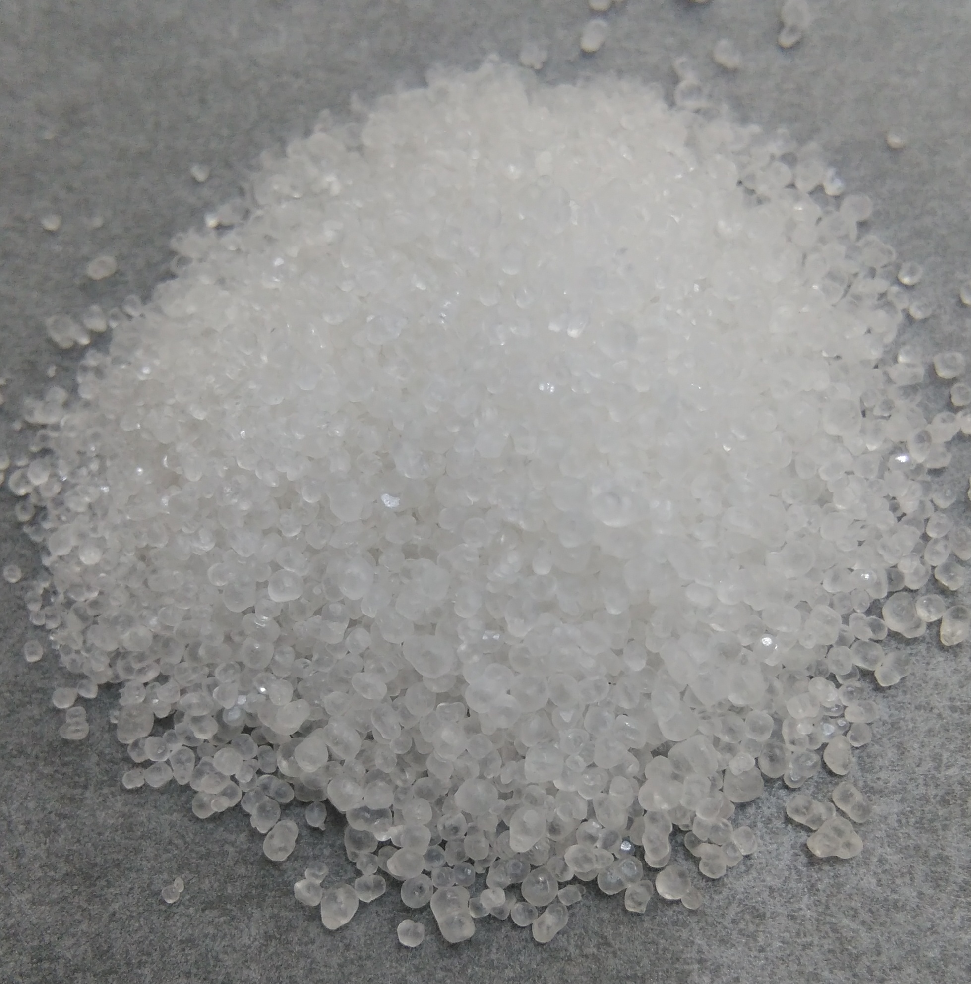 4-氨基吡啶，纯度98%.